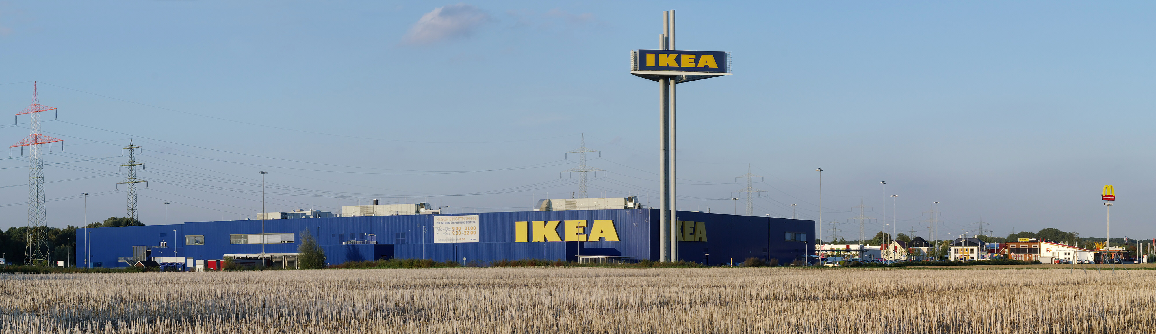 Blick auf das "Kamen Karree" aus Richtung der A1 mit der Ikea-Niederlassung im Vordergrund